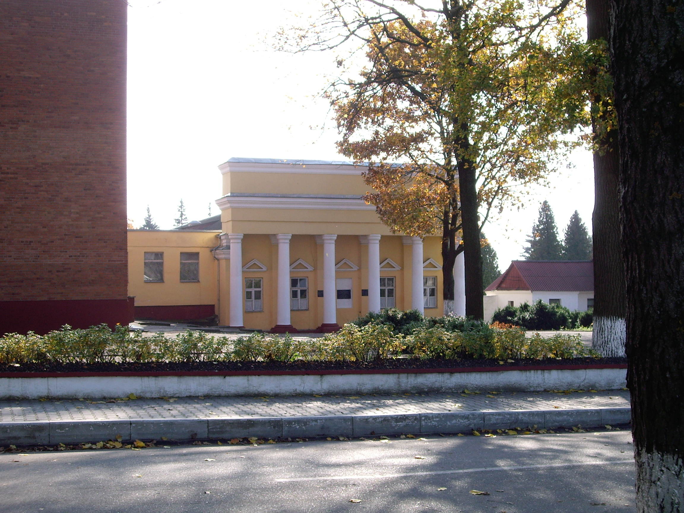 Беларуская (тарашкевіца): Будынак былой гімназіі (бальніца). г. п. Сьвіслач This is a photo of Belarusian heritage monument. Reference number: 412Г000469 ( WLM)